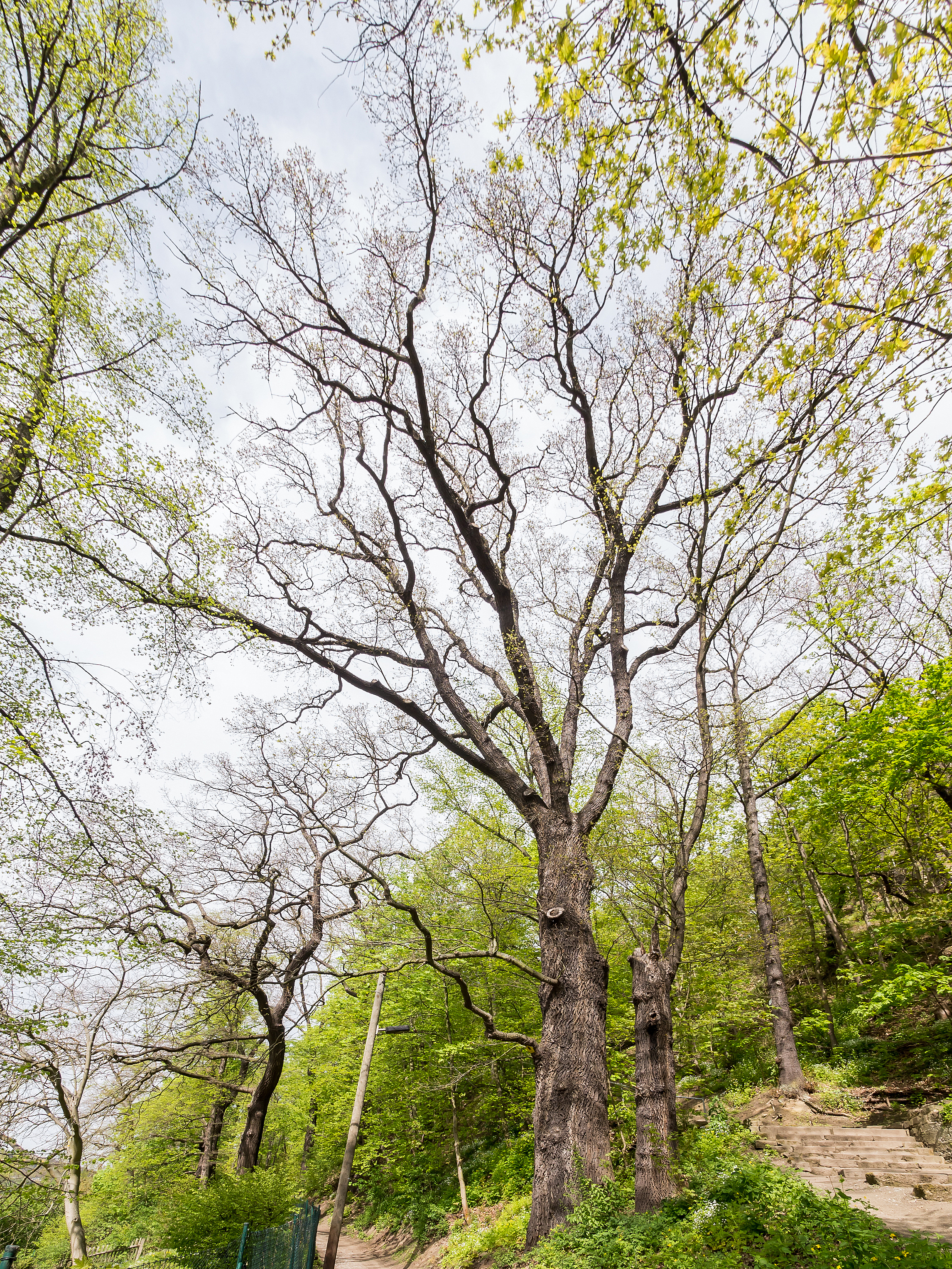 Eiche an der Schillershöhe III Naturdenkmal DE-TH